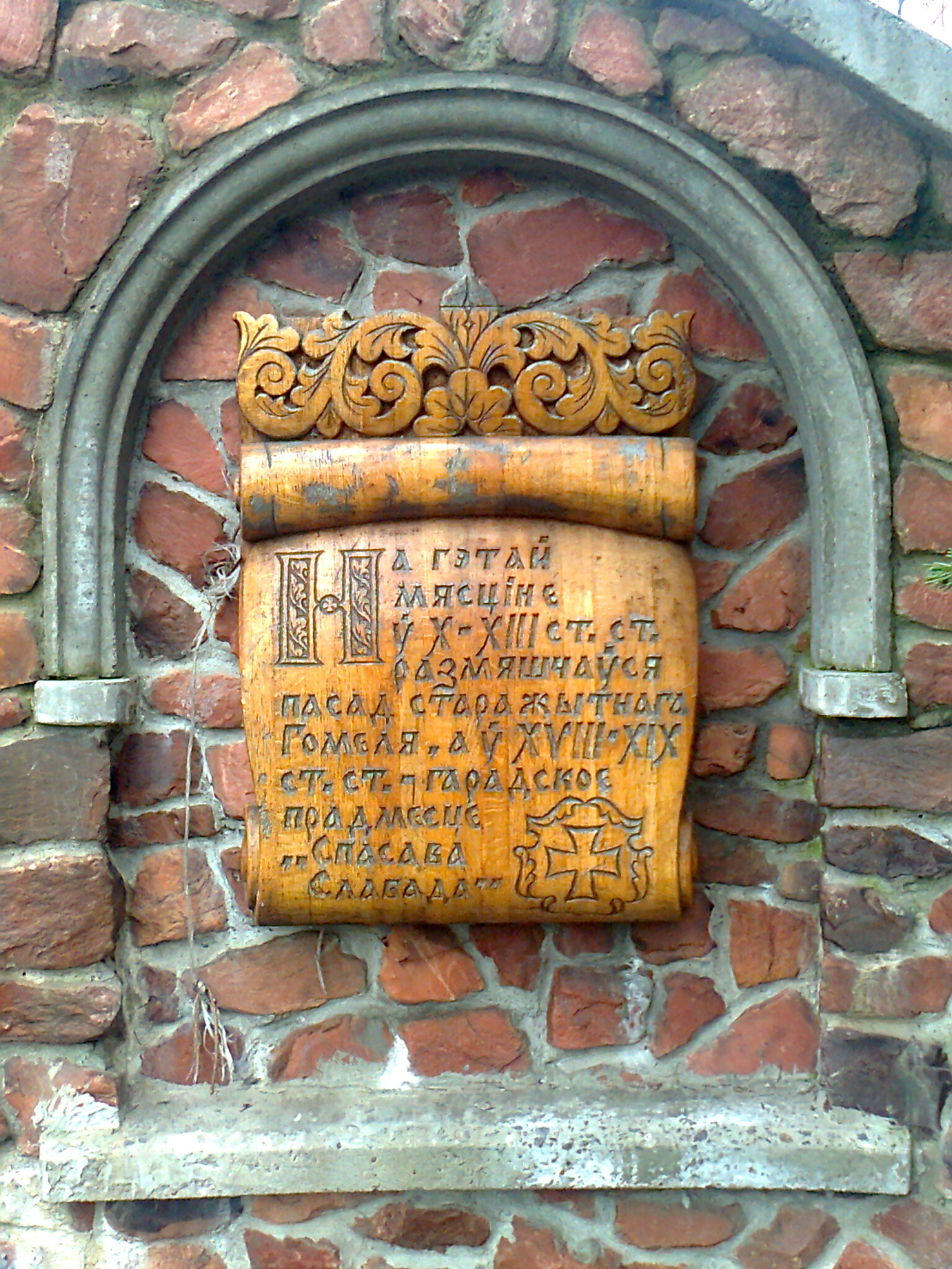 Беларуская (тарашкевіца): Гарадзішча старажытнага Гомелю (дзядзінец). Культурны пласт пэрыяду раньняга жалезнага веку і сярэднявечча. г. Гомель This is a photo of Belarusian heritage monument. Reference number: 313В000025 ( WLM)